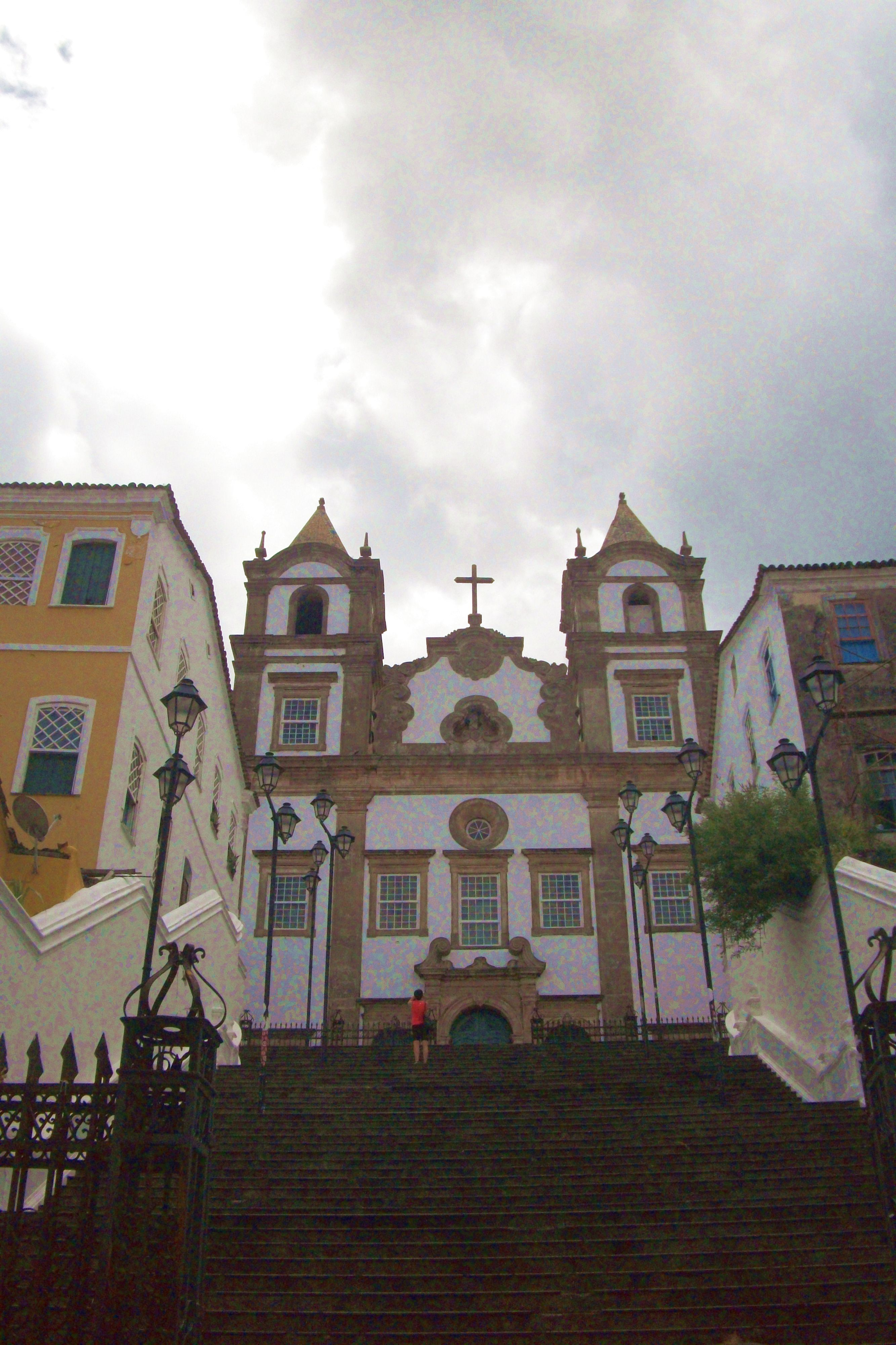 Igreja da Rua do Passo (também conhecida como Igreja do Santíssimo Sacramento), localizada à Rua Ribeiro dos Santos, 52 A